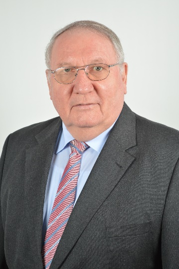 Winfried Pinninghoff (2017)